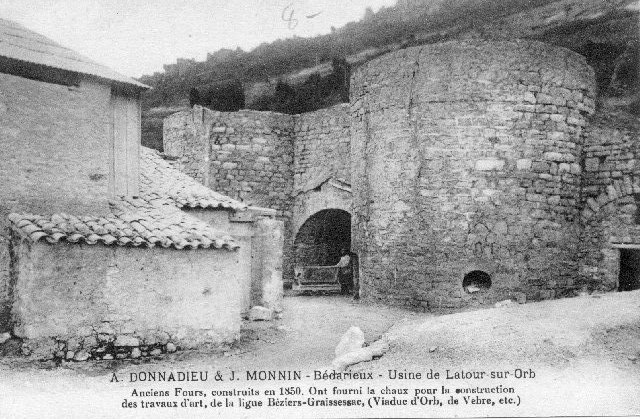 La Tour-sur-Orb - détail des fours en 1920